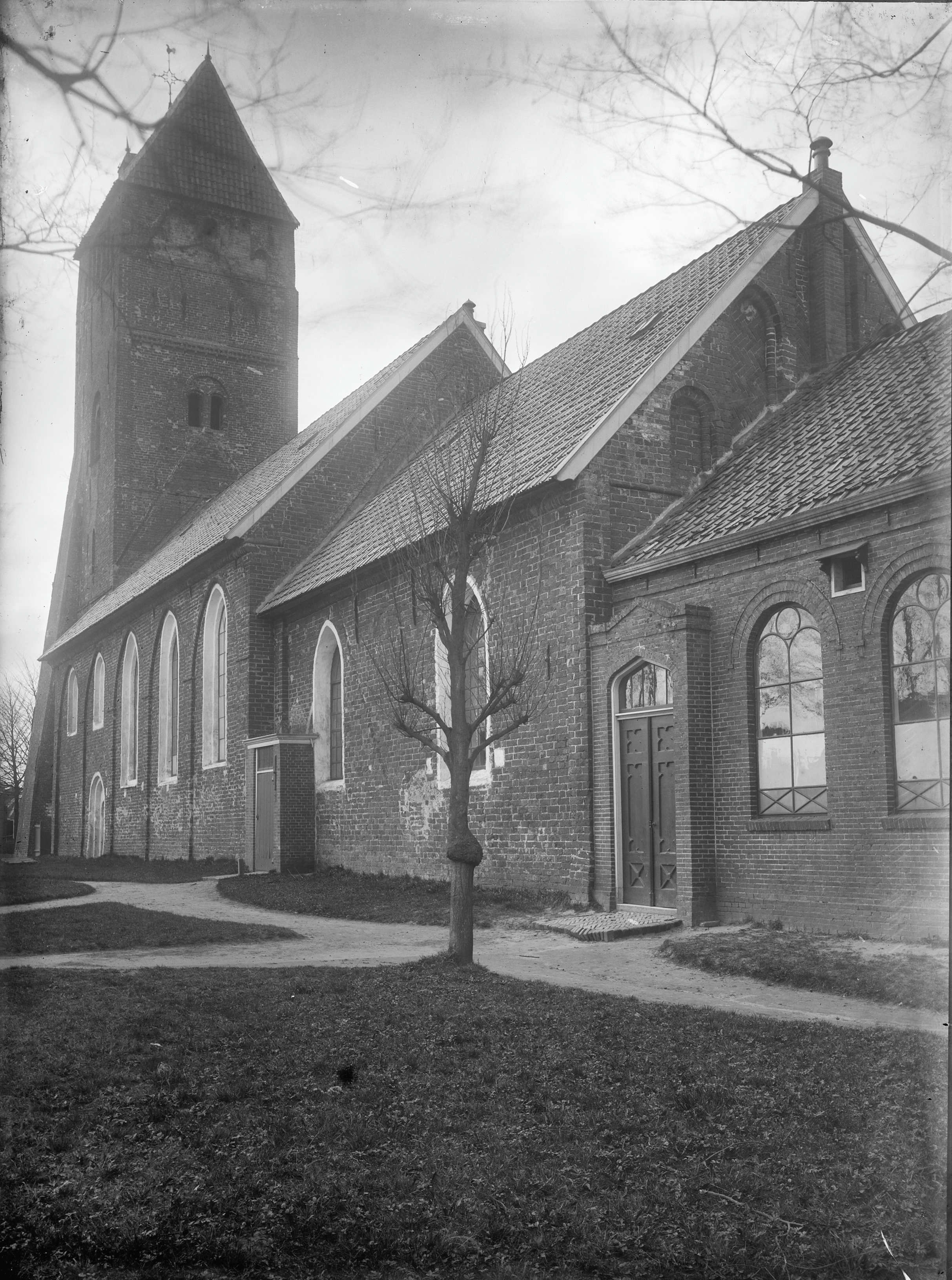 N.H.Kerk: exterieur vanuit het zuid-oosten